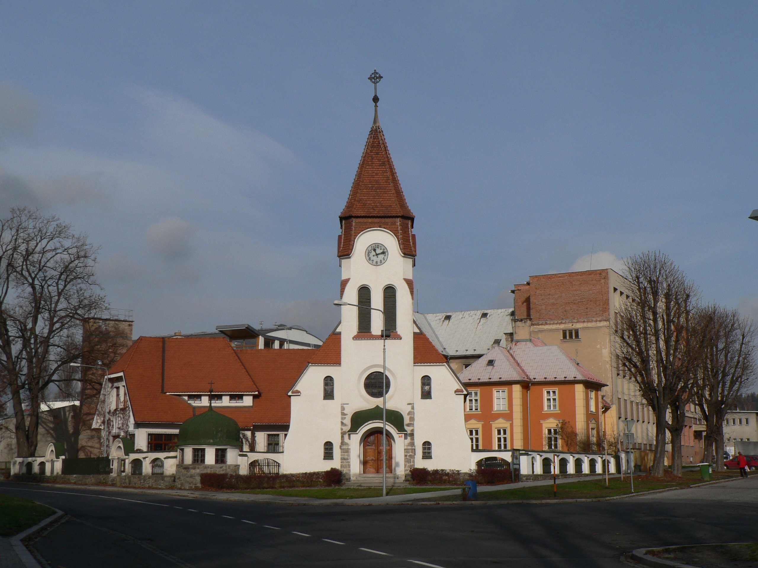 Kostel svatého Jana Evangelisty (Šumperk)